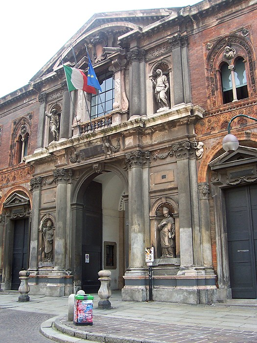 Milano - Cà Granda (Università Statale)